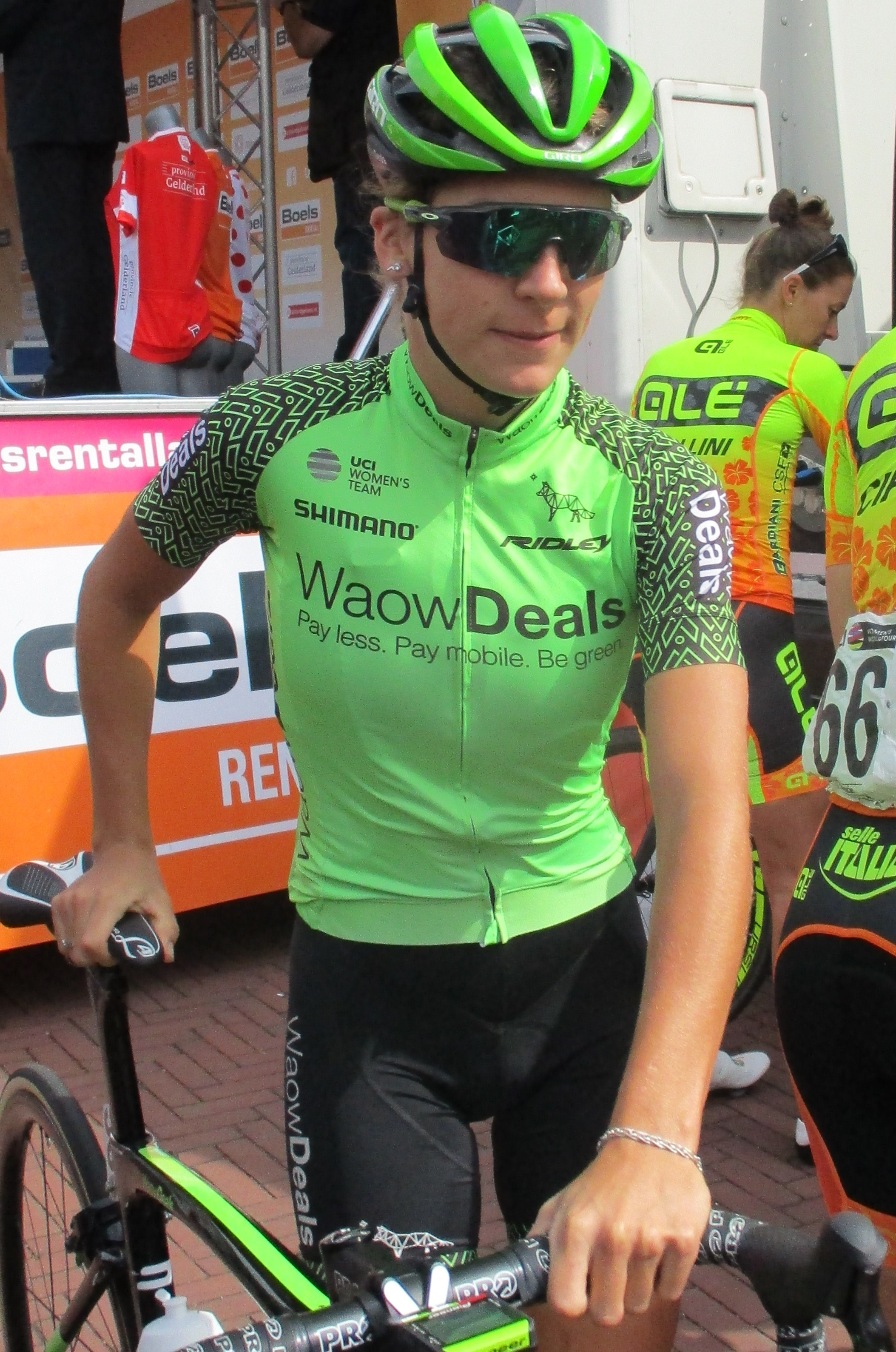 4e etappe van de Boels Ladies Tour 2018 door Noord-Limburg, start in Stramproy.